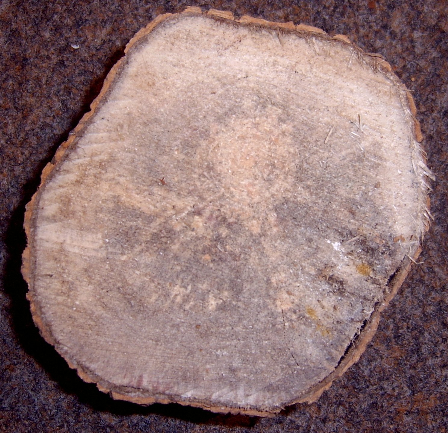 Foto taken by Lumbar 16:18, 6 November 2005 (UTC) in Osnabrück